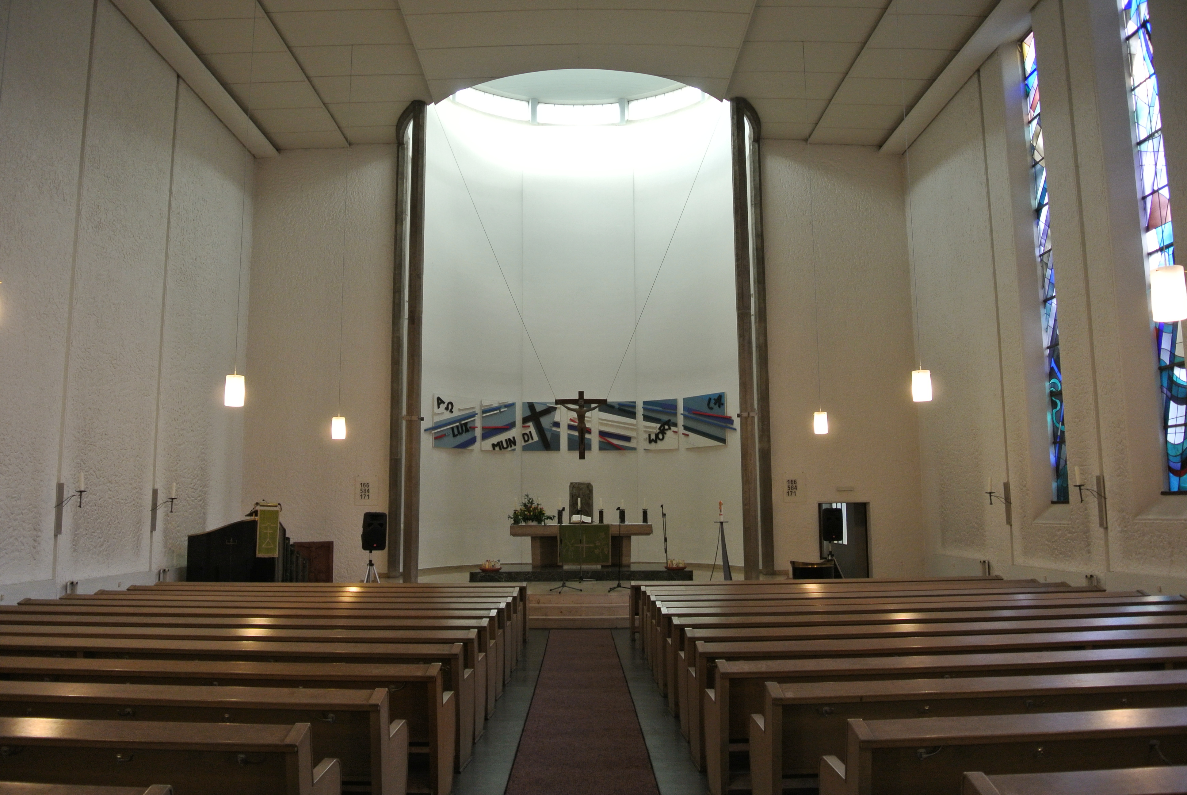 Erlöserkirche in Frankfurt-Oberrad von Alfred Schild, 1956, Innenraum